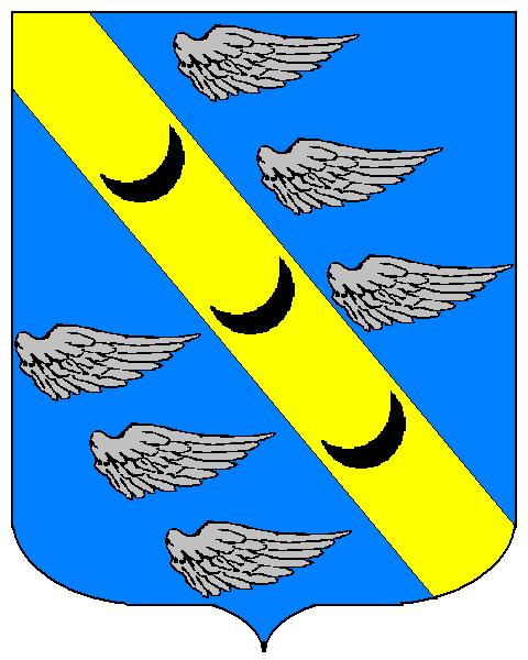 Grb obitelji Bakić